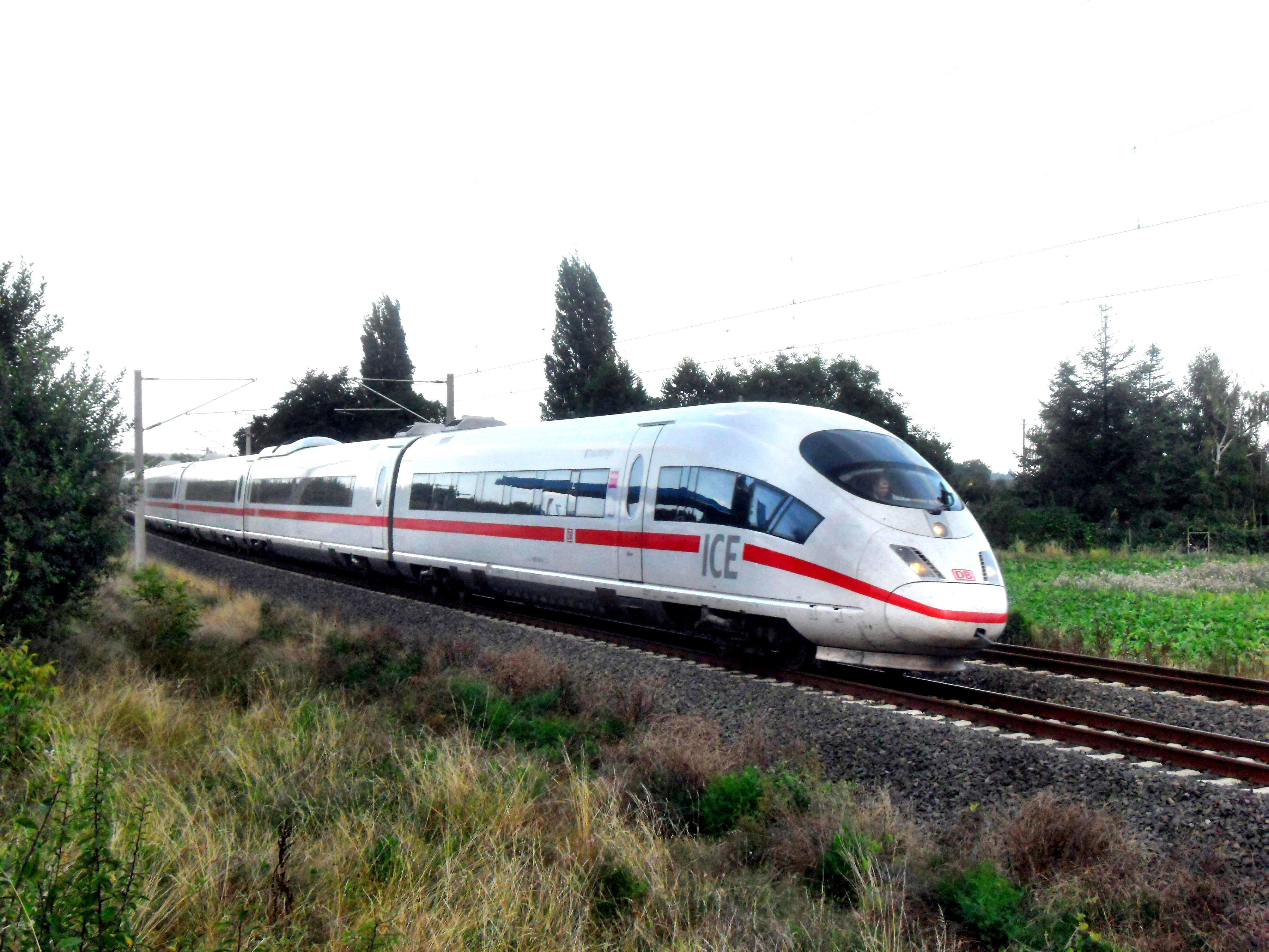 ICE 3 auf Verbindungsstrecke des Wiesbadener Hauptbahnhofes zur Schnellfahrstrecke Köln–Rhein-Main der DB bei Wiesbaden-Erbenheim